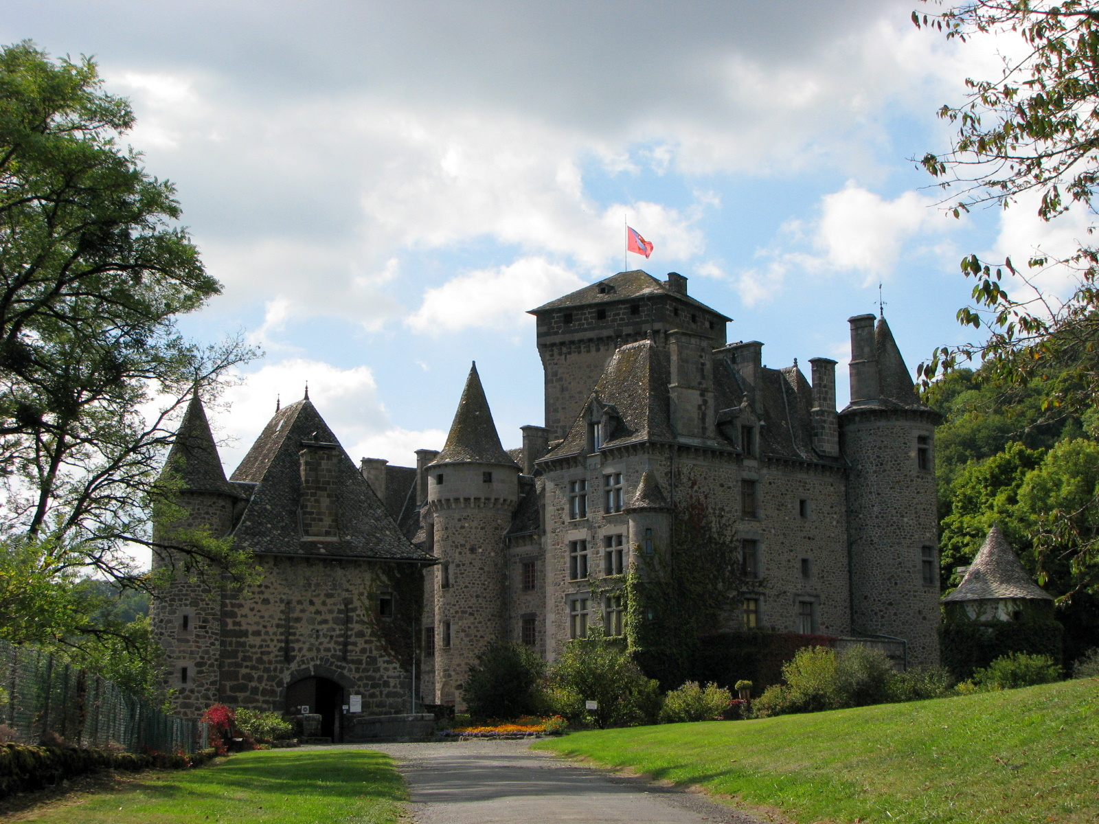 Schloss Pesteils, Polminhac, Cantal